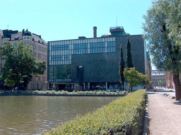 Kansallisteatterin Pieni Näyttämö, Helsinki. Rakennus on valmistunut vuonna 1954, ja sen ovat suunnitelleet arkkitehdit Kaija ja Heikki Sirén.